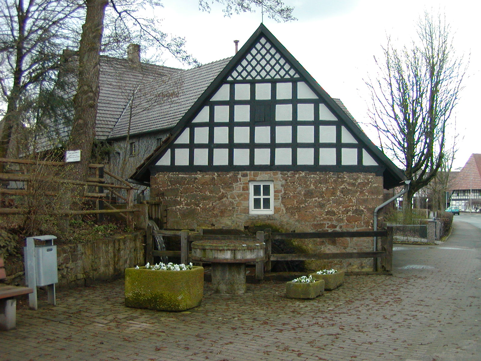 Wassermühle in Eilhausen, Stadt Lübbecke, Nordrhein-Westfalen. Die Mühle ist Teil der Westfälischen Mühlenstraße im Mühlenkreis Minden-Lübbecke. This image shows a heritage building in Germany, located in the North Rhine-Westphalian city Lübbecke (no. 009).